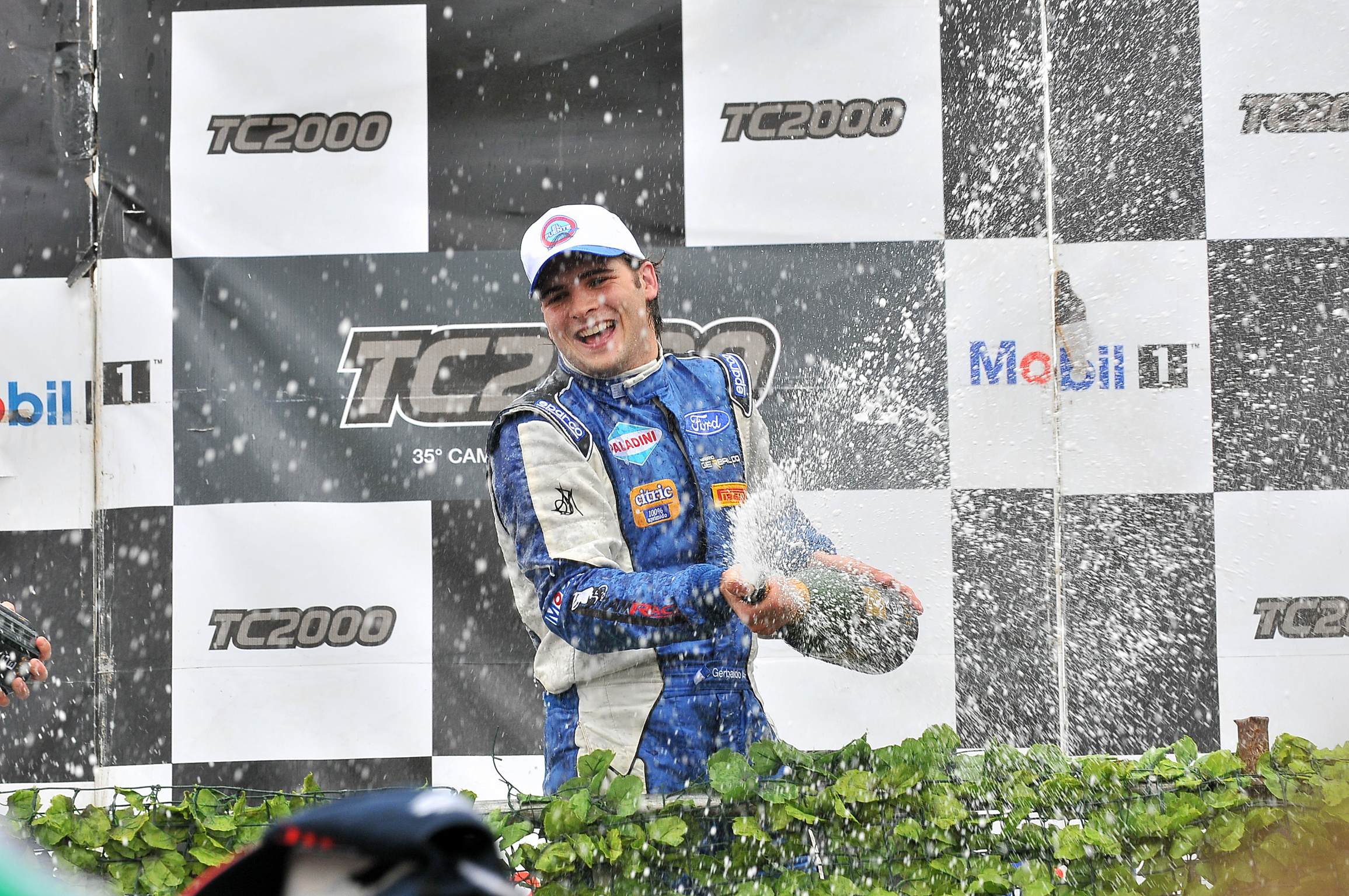 Mario Gerbaldo